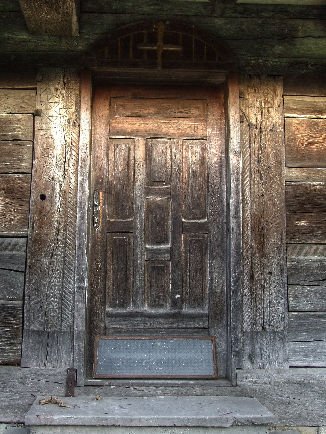 Biserica de lemn din Buzaş, judeţul Sălaj. Primul portal - intrarea în axul bisericii.